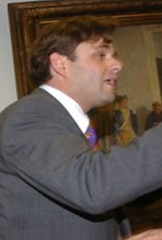 O Político brasileiro Leonard Quintão